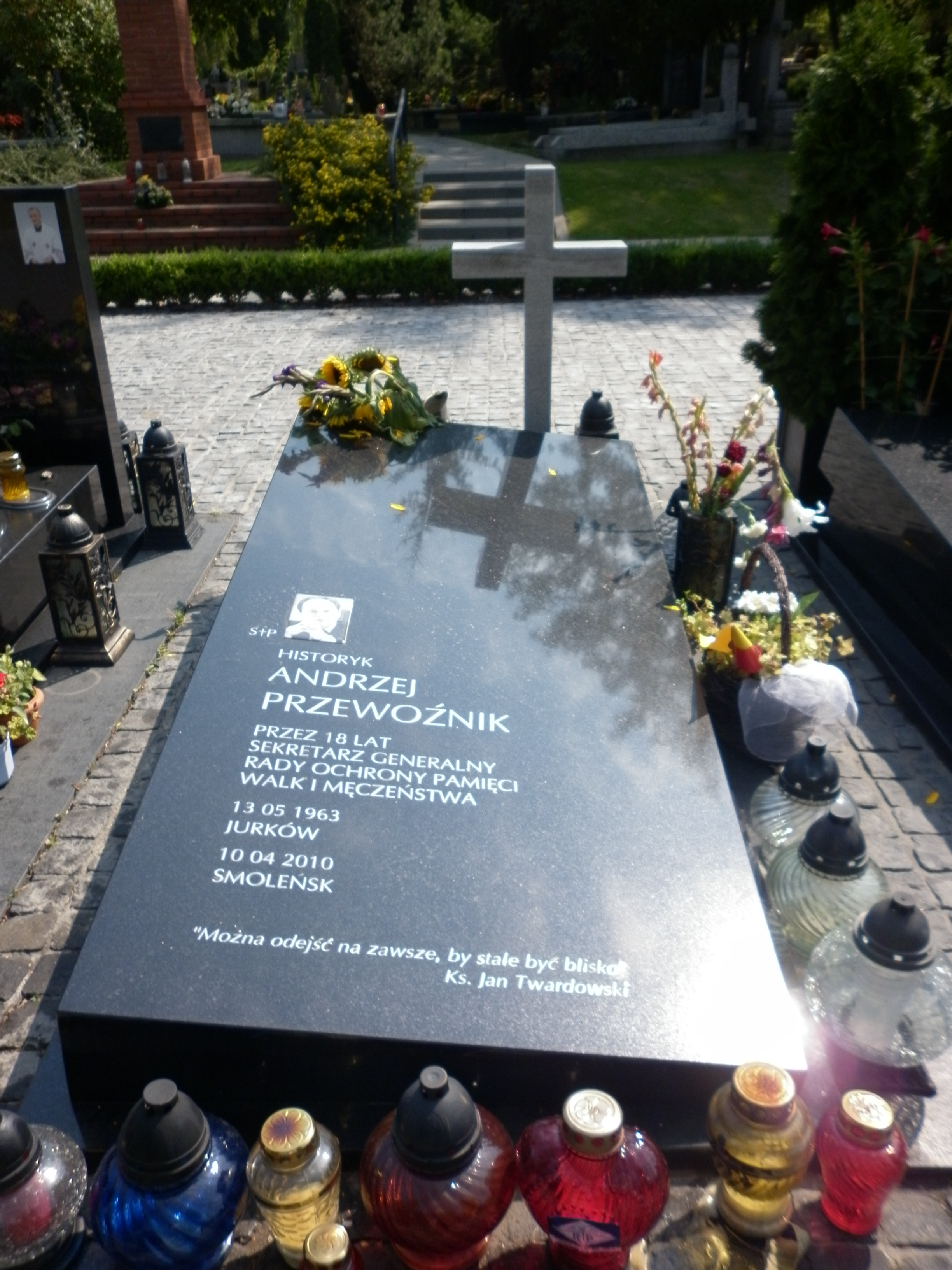 GróbAndrzeja Przewoźnika na Cmentarzu Wojskowym na Powązkach